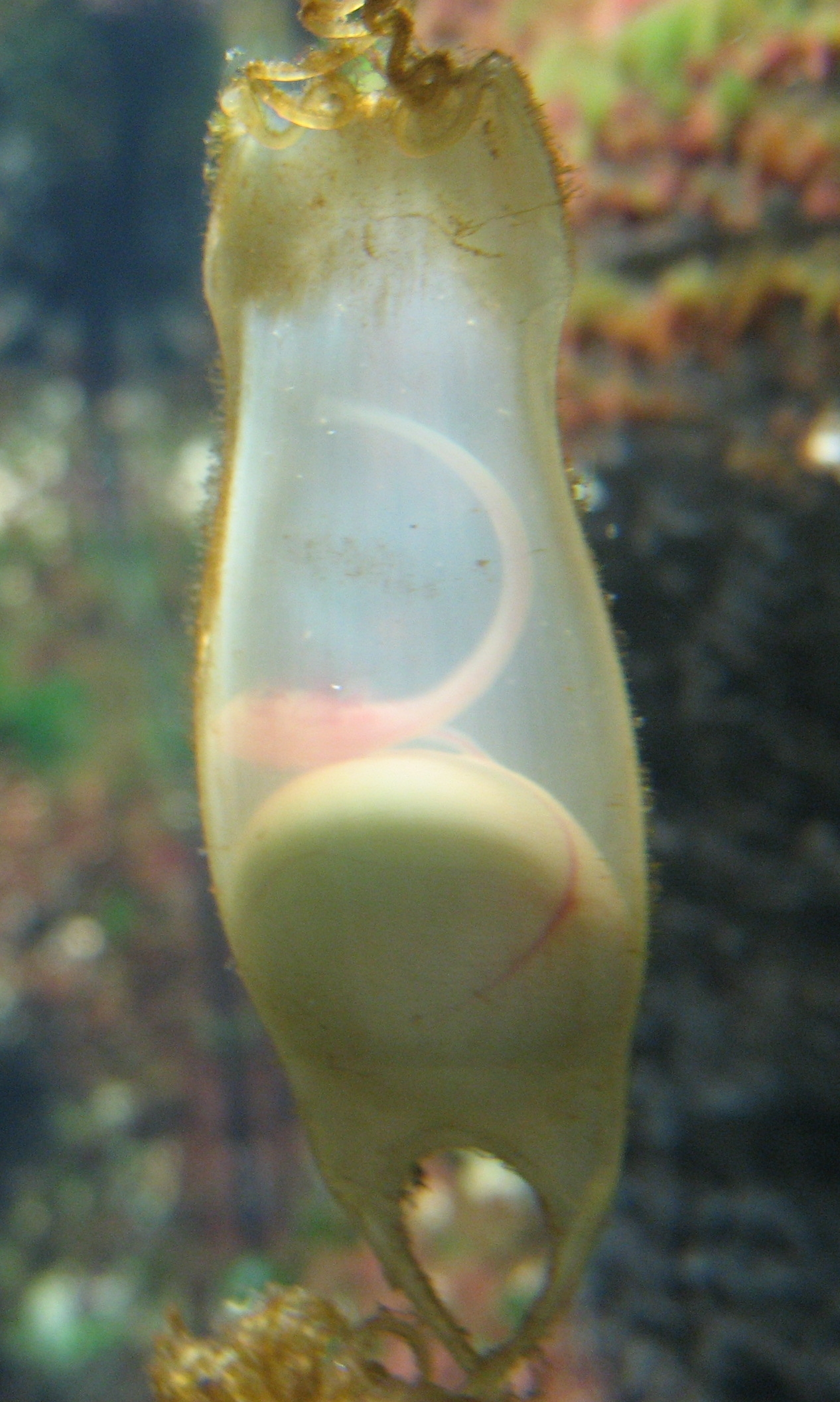 Scyliorhinus canicula eggs in Aquarium Cinéaqua Map: 48° 51' 44" N 2° 17' 27" E